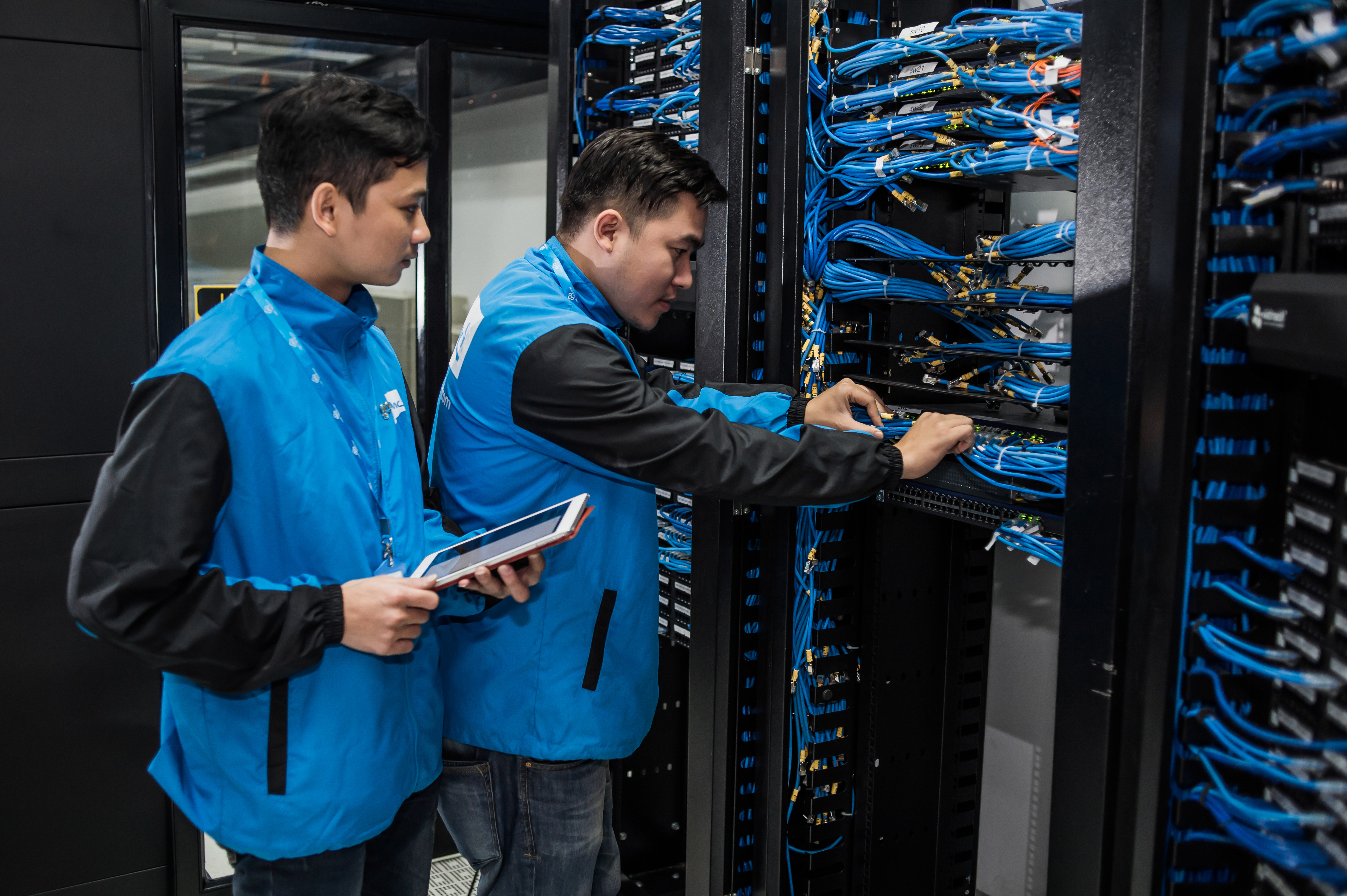 Data Center của CMC Telecom